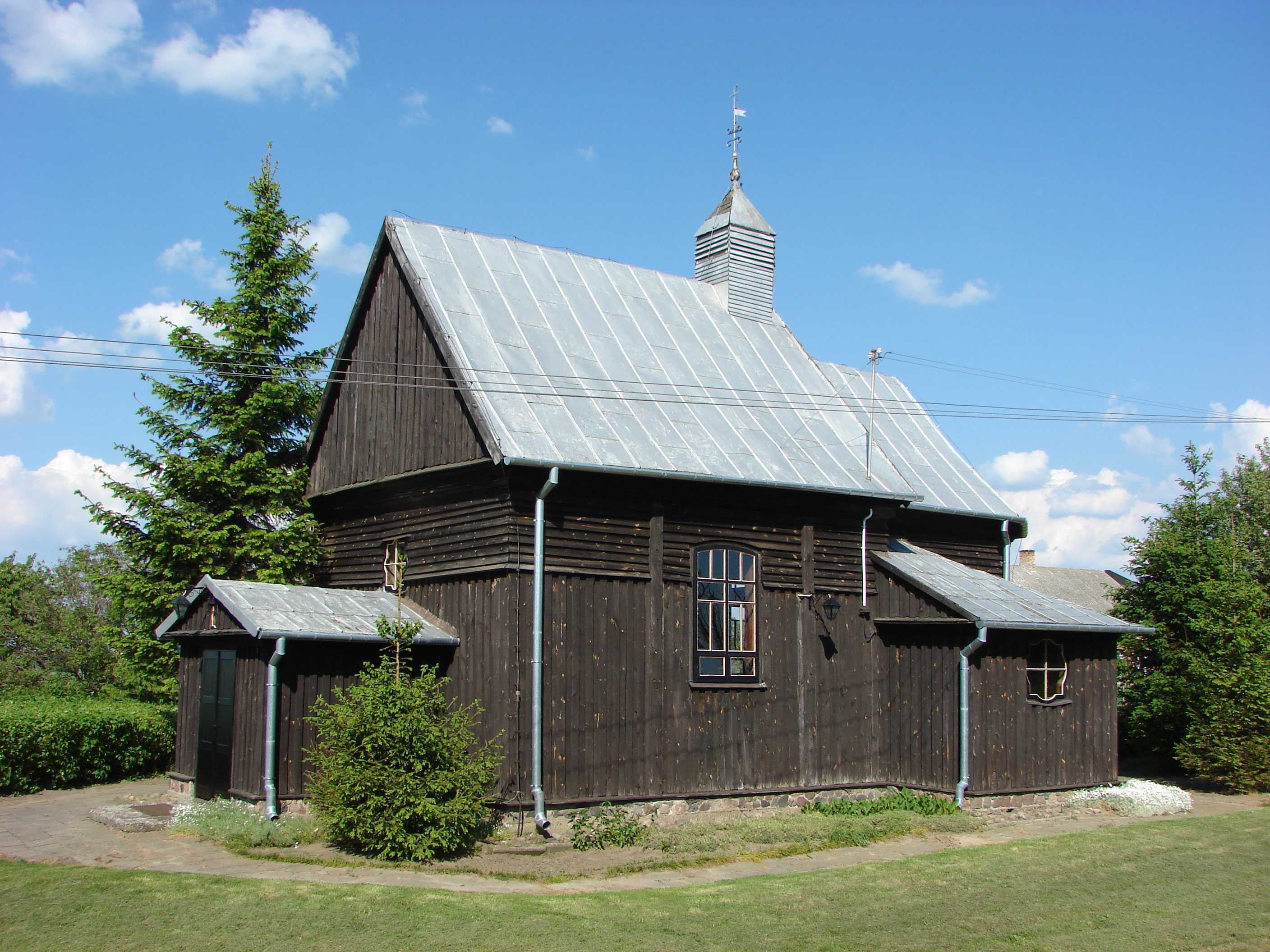 Nakonowo, Gmina Kowal. Church of Saint Mark called "Diabełek" what means ... Little Devil.